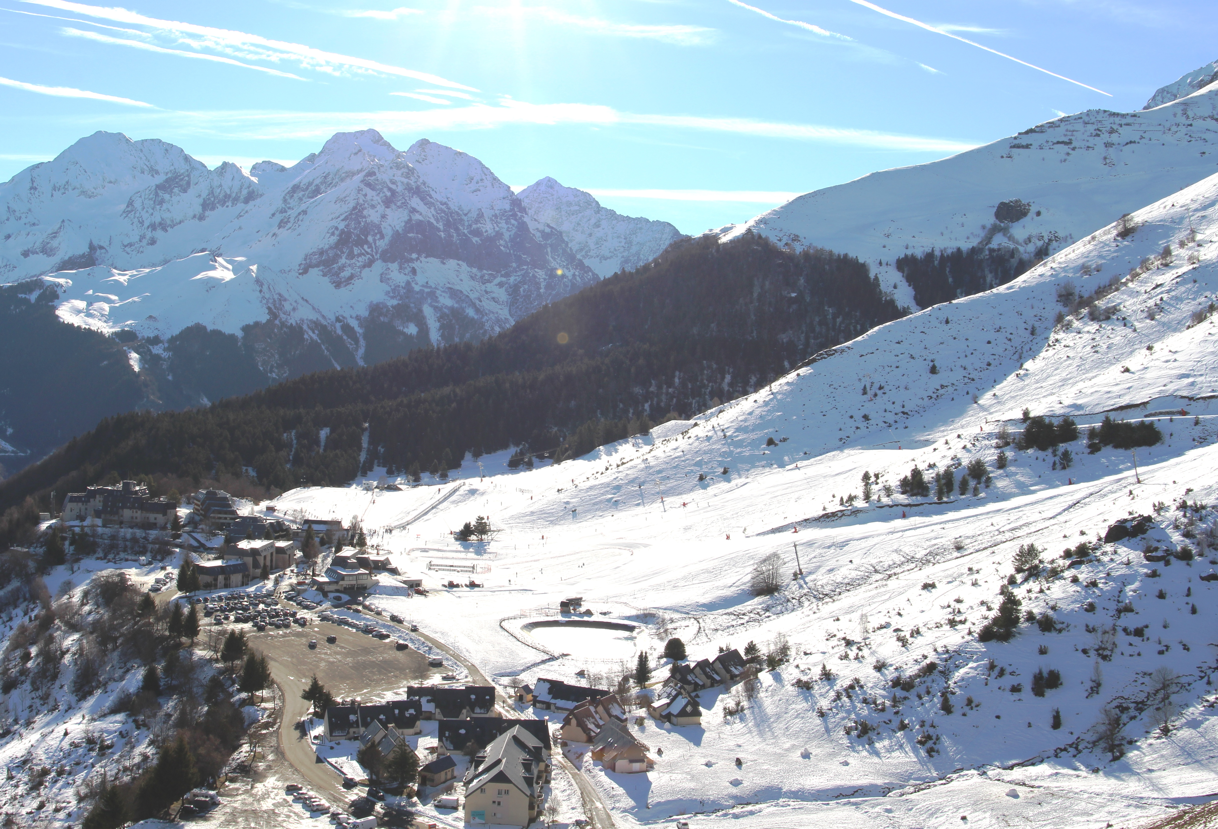 Station de Val Louron (Hautes-Pyrénées)